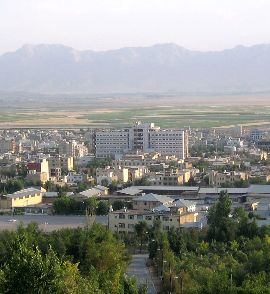 پانوراما شهركرد